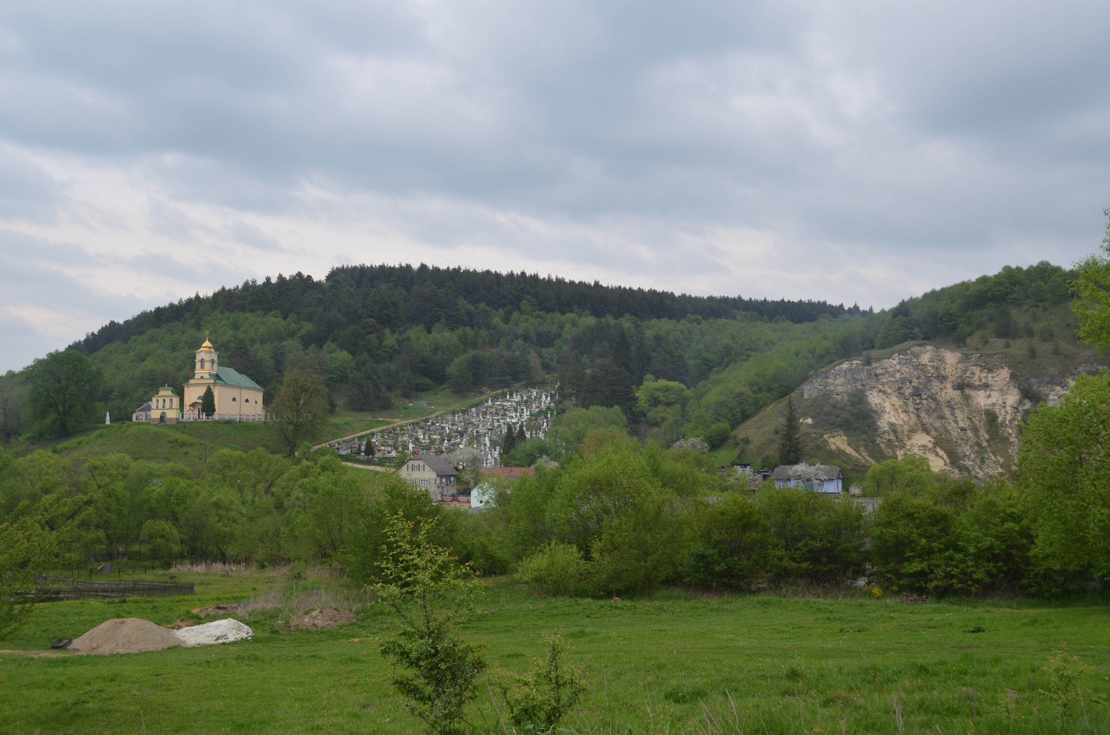 «Стільська», Миколаївський р-н, Стрийський ДЛГ, Роздольське л-во, кв. 7-17; біля с. Стільсько